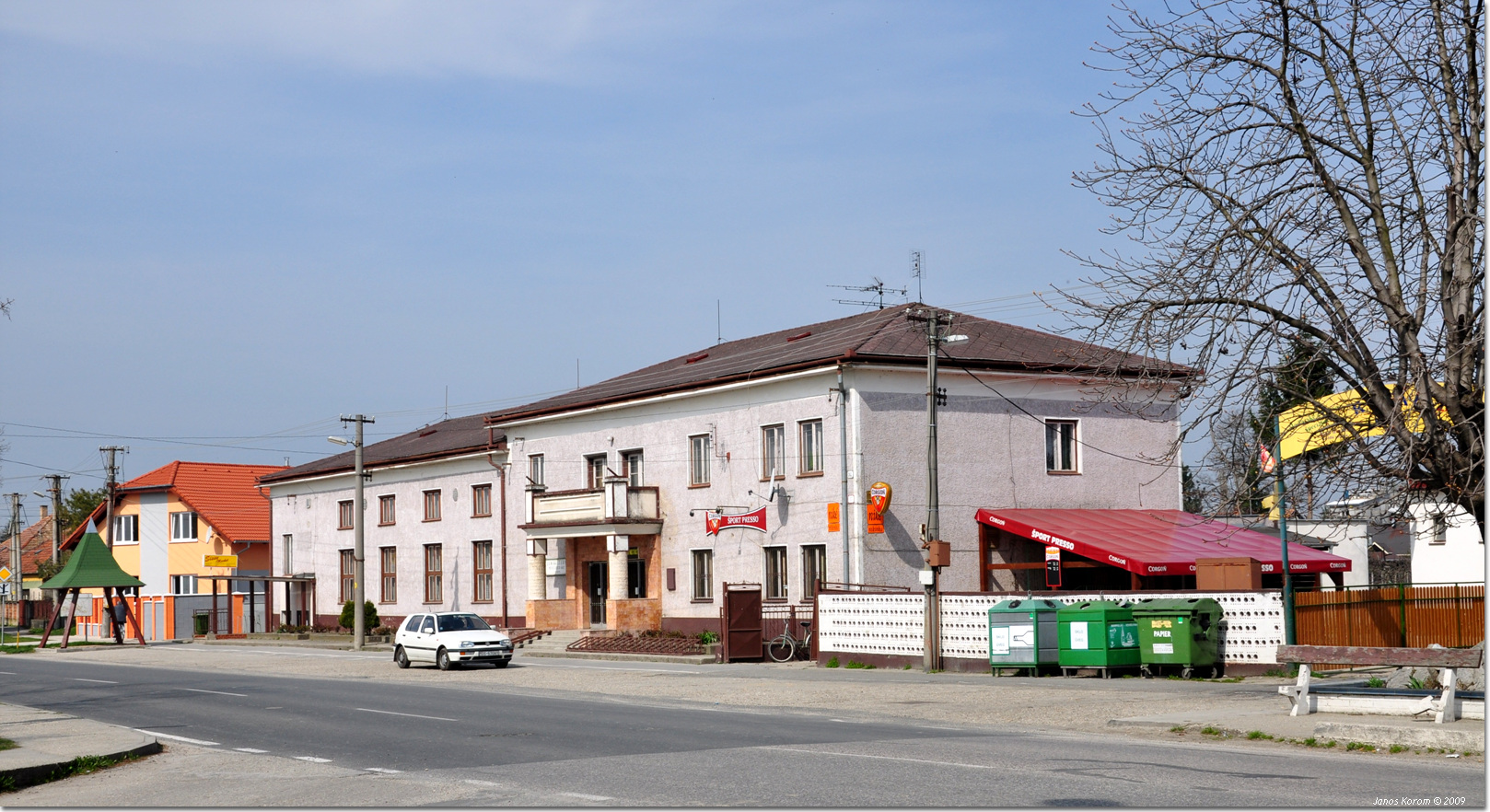 Jahodná